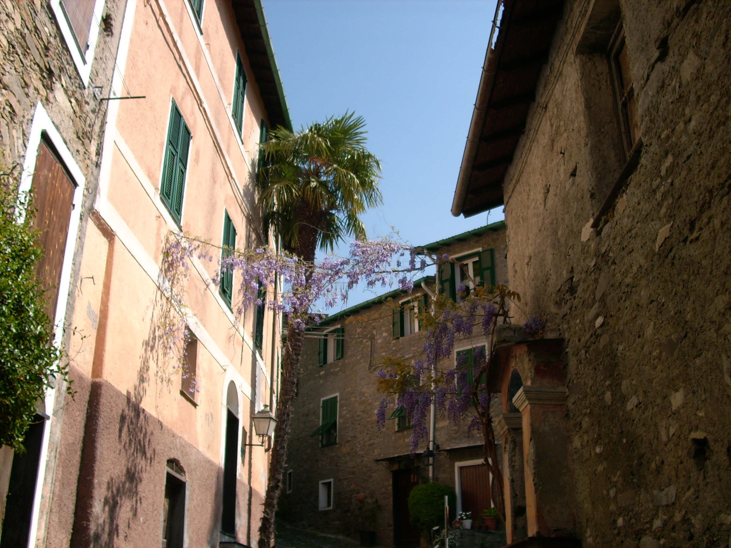 Molini di Triora, Liguria, Italia